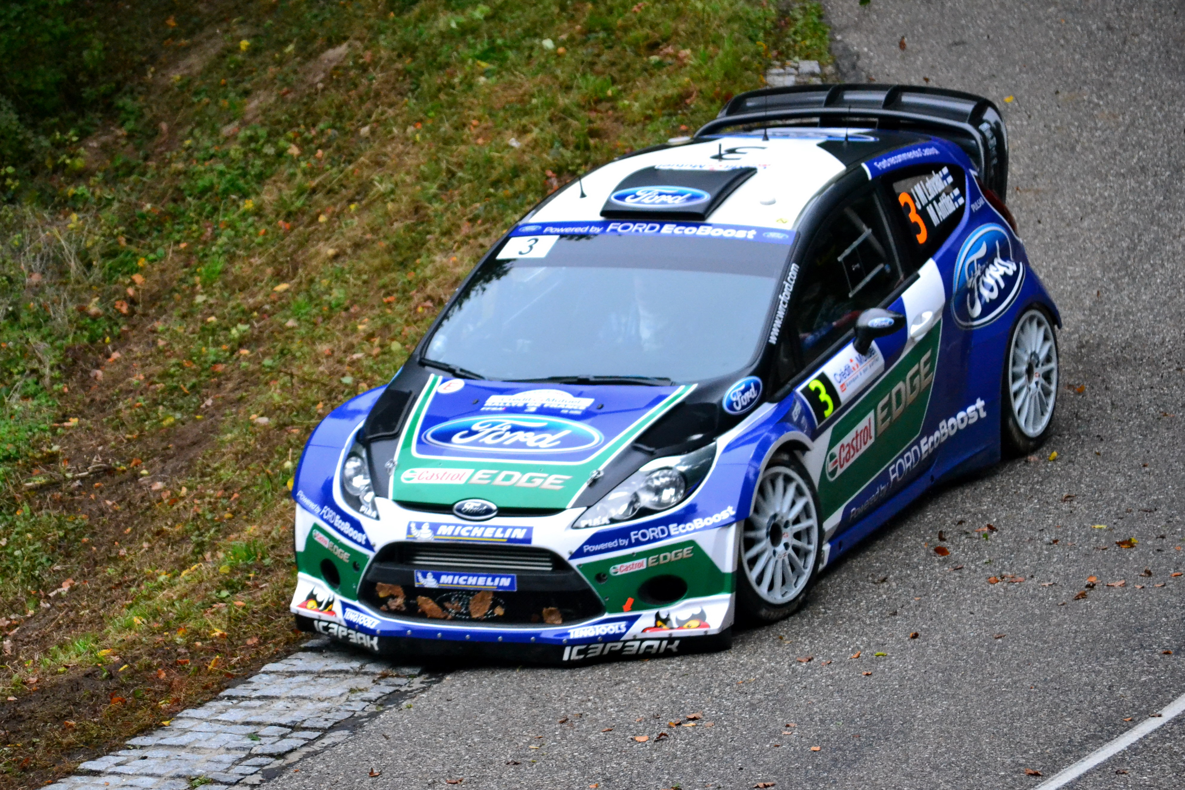 Rallye WRC France-Alsace 2012, ES2 Hohlandsbourg-Firstplan 1. Ford Fiesta WRC - Jari-Matti Latvala/Miikka Anttila